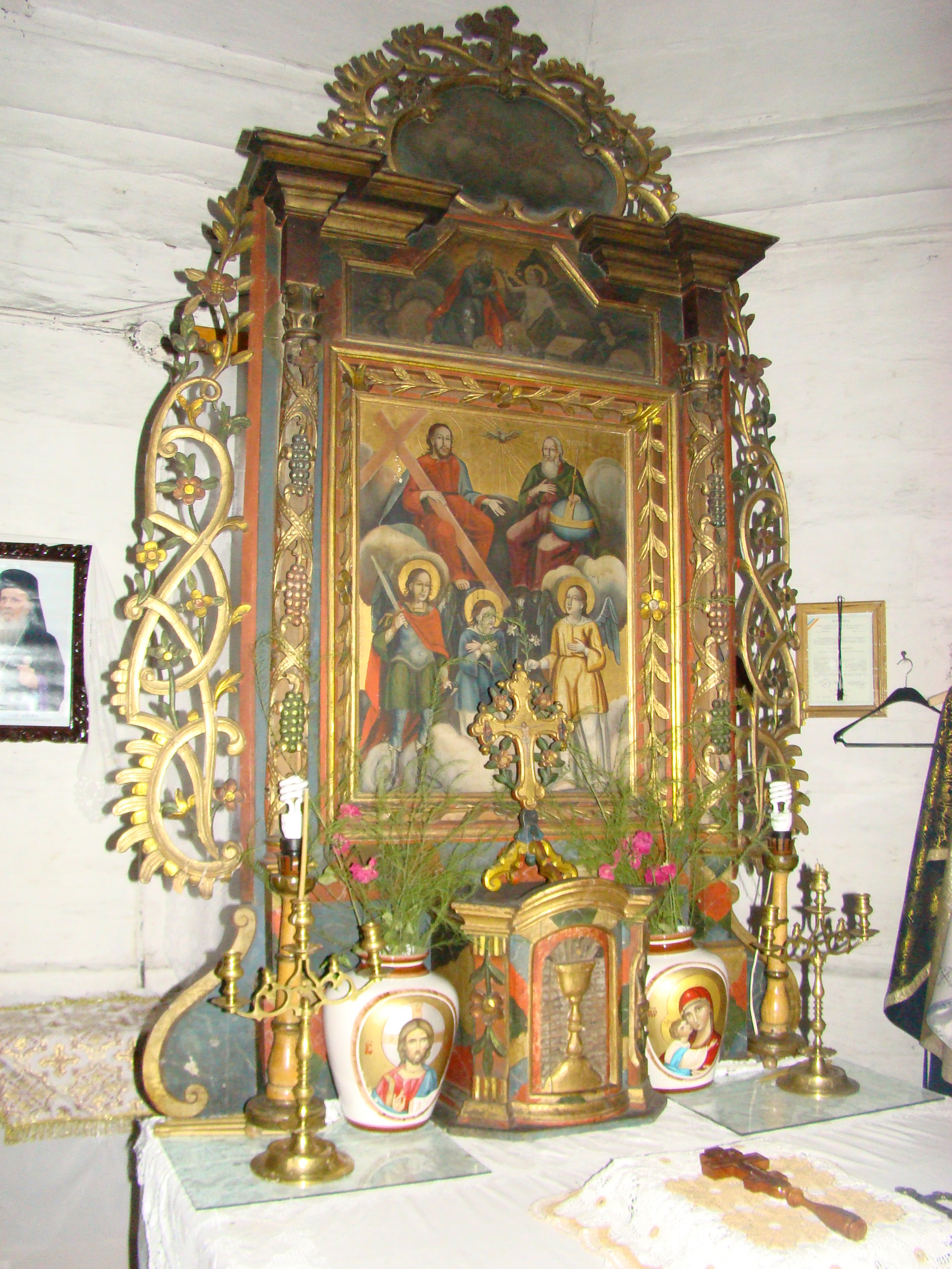 Biserica de lemn "Sfinții Arhangheli Mihail şi Gavril", sat PLOPIŞ; comuna ŞIŞEŞTI